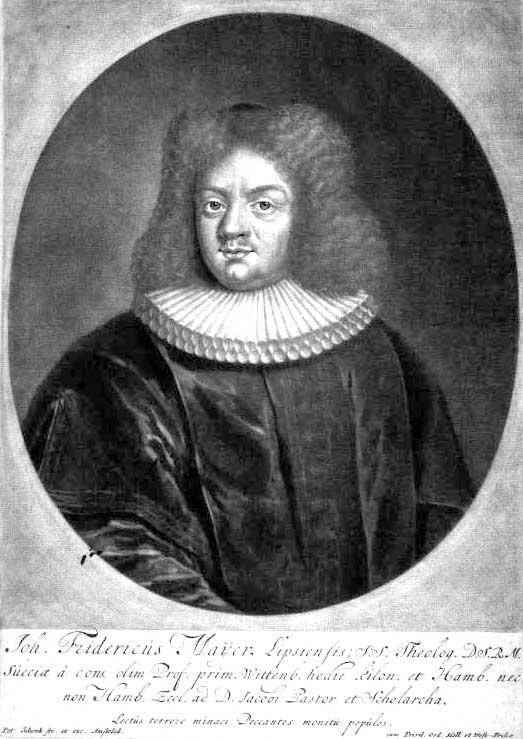 Johann Friedrich Mayer (1650-1712) deutscher lutherischer Theologe